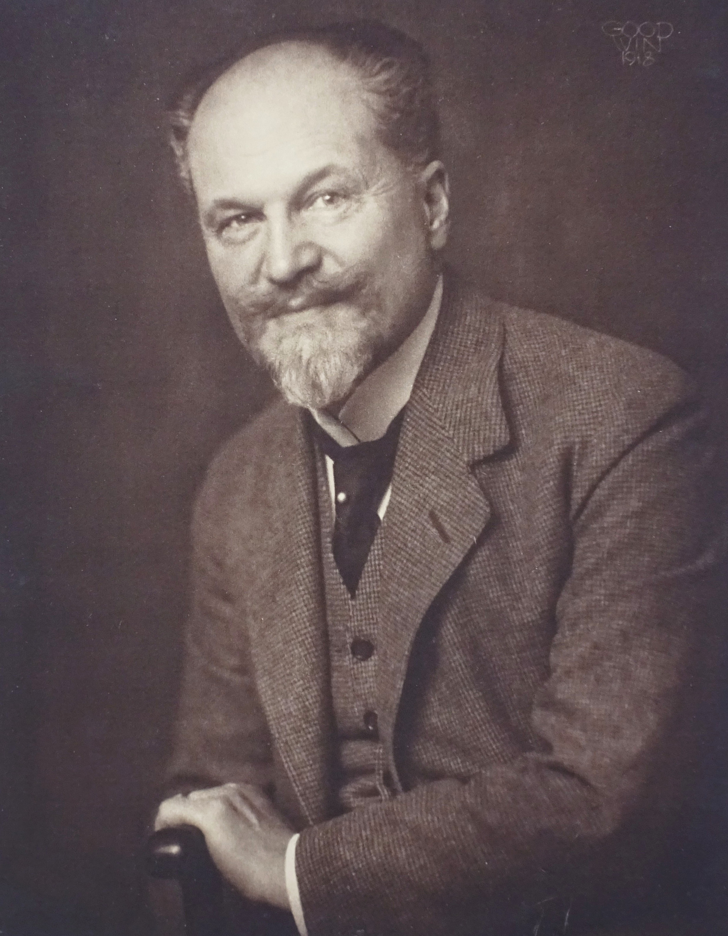 Ernest Thiel, fotograferat av Henry B. Goodwin